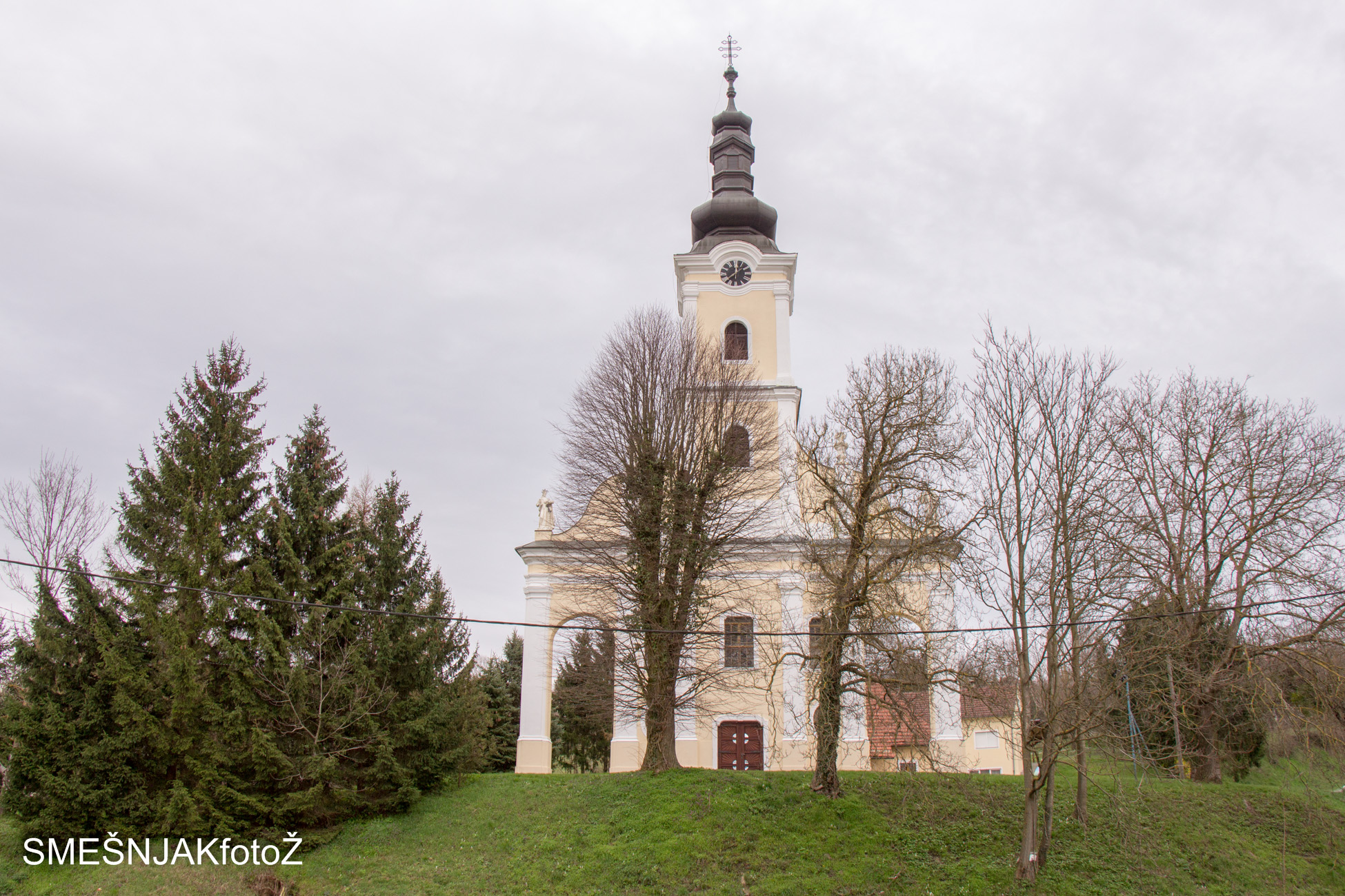 Crkva Presvetog Trojstva